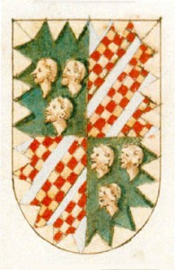 Blason des Malatesta